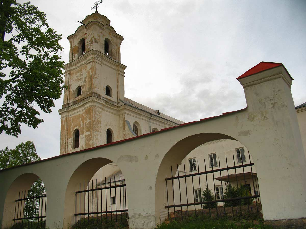 Беларуская (тарашкевіца): Друя